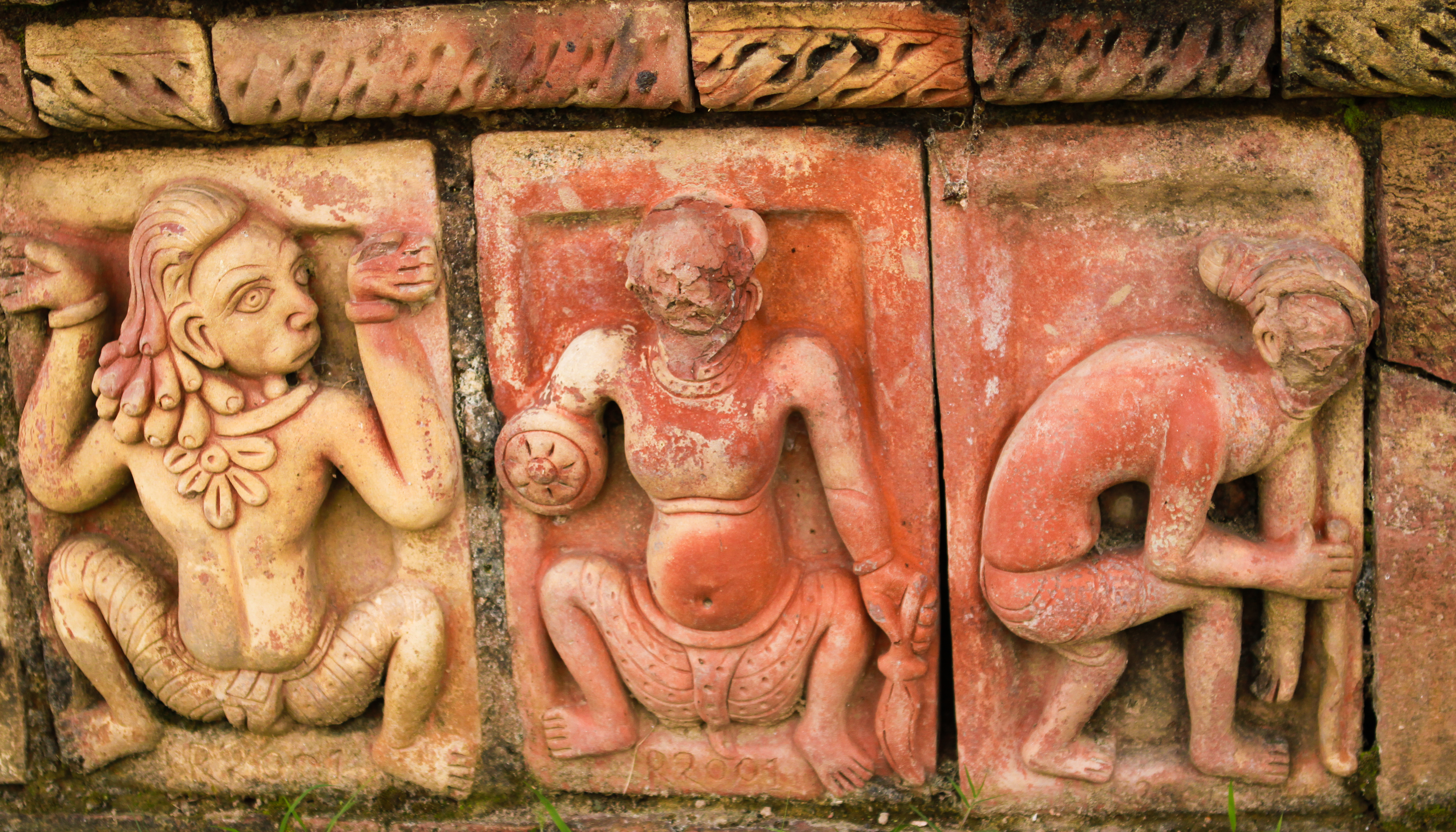 পাহাড়পুর বৌদ্ধ বিহার